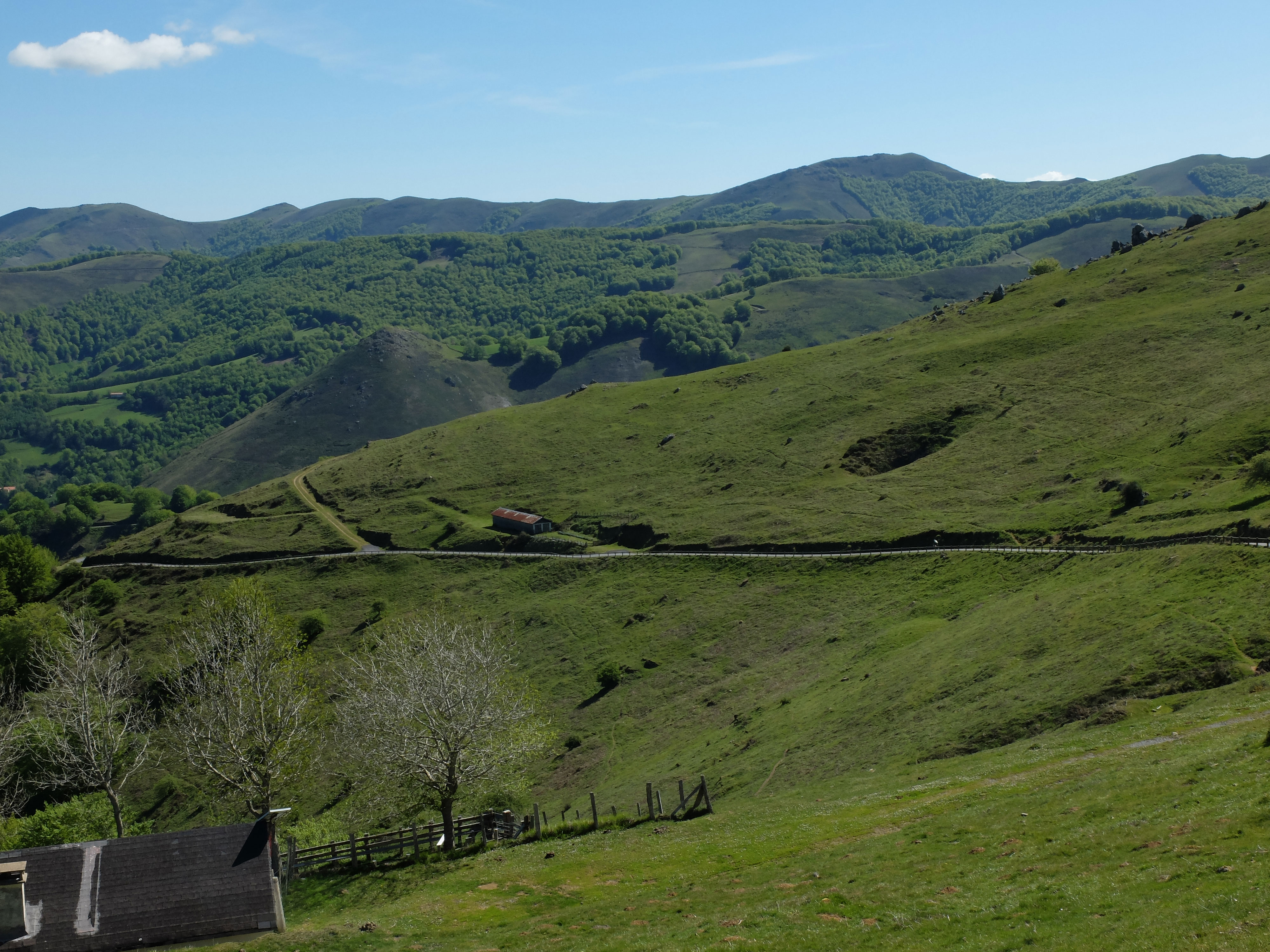 Monte Alduide vista desde Sorogain hacia el Este This is a photography of a Special Area of Conservation in Spain with the ID: ES2200019. Natura2000 entry, EEA entry